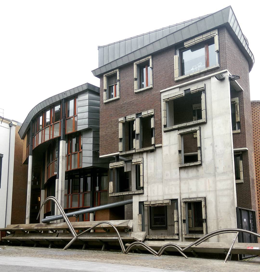 Enric Miralles uitbreiding stadhuis Utrecht